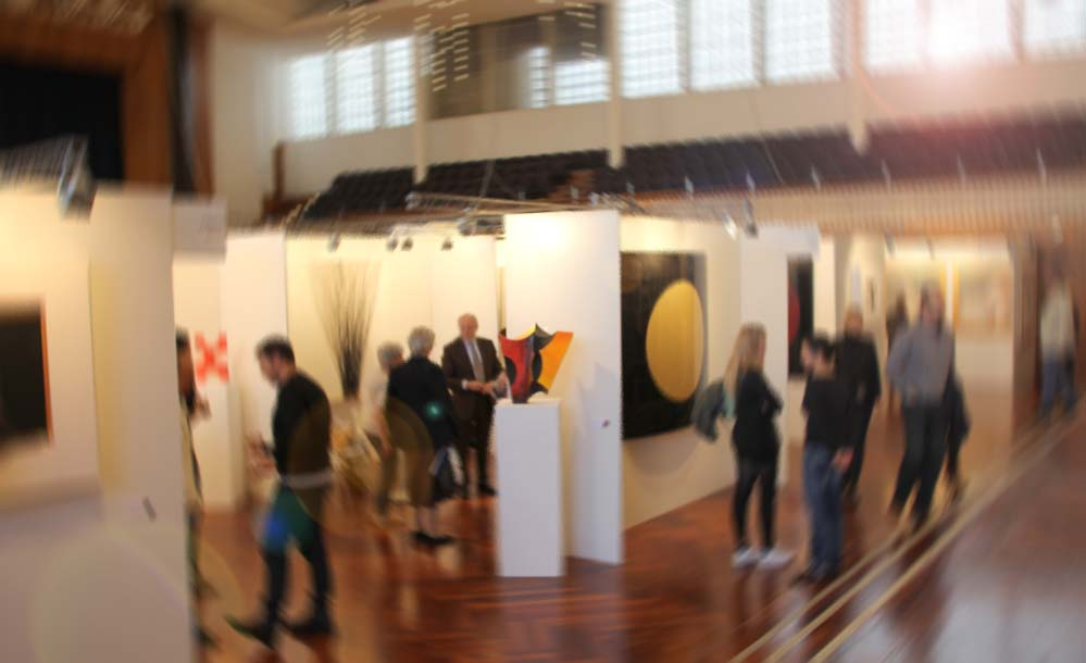 Kunstmesse Art International Zurich in Zürich, Schweiz